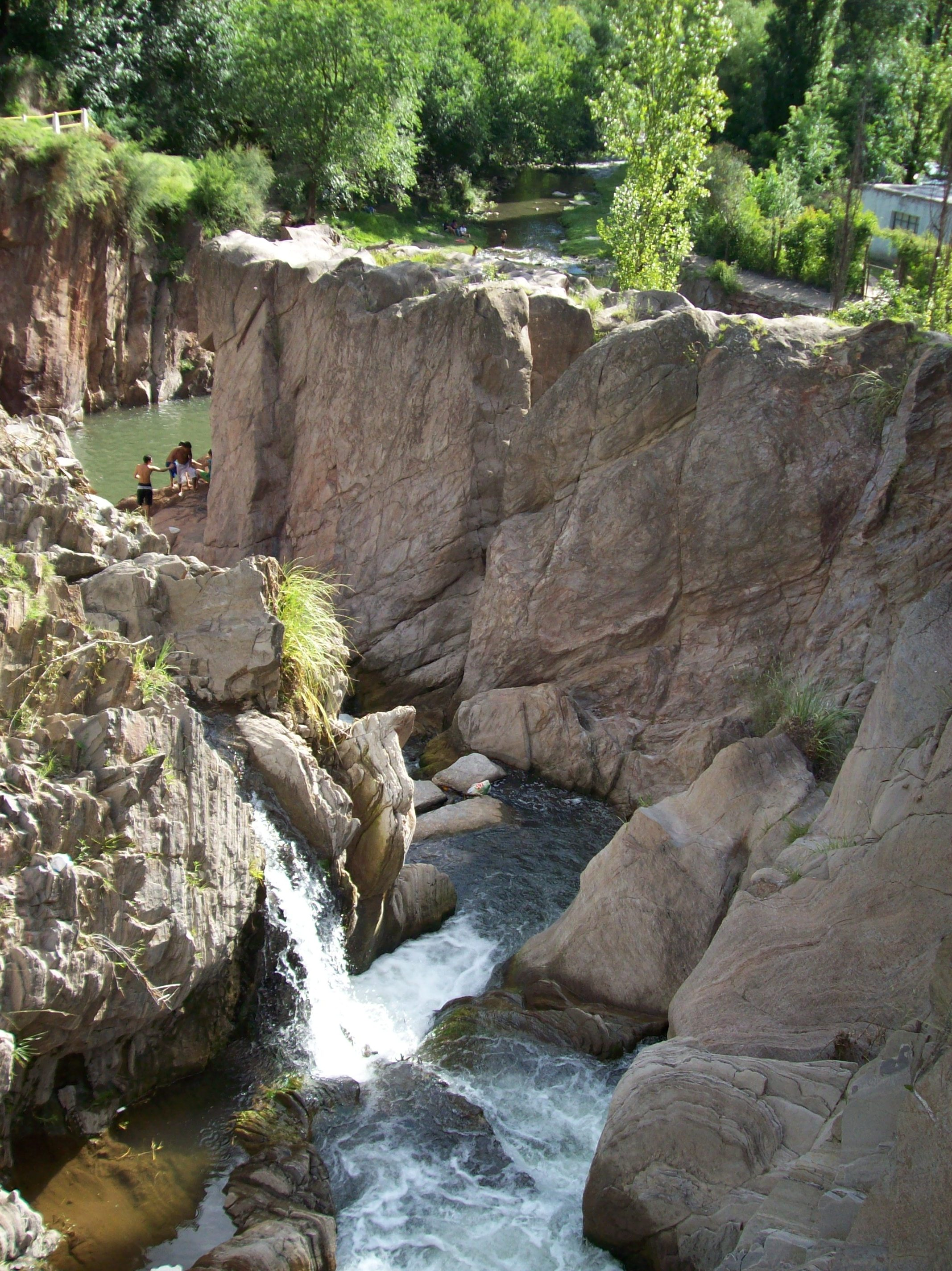 Salto Colorado del Río Volcán en El Volcán, Provincia de San Luis, Argentina.